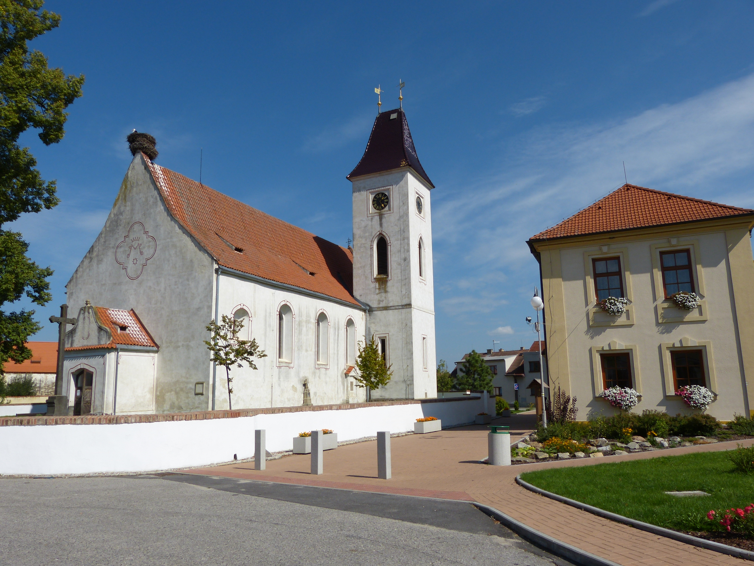 Kostel Nanebevzetí Panny Marie, Dubné.